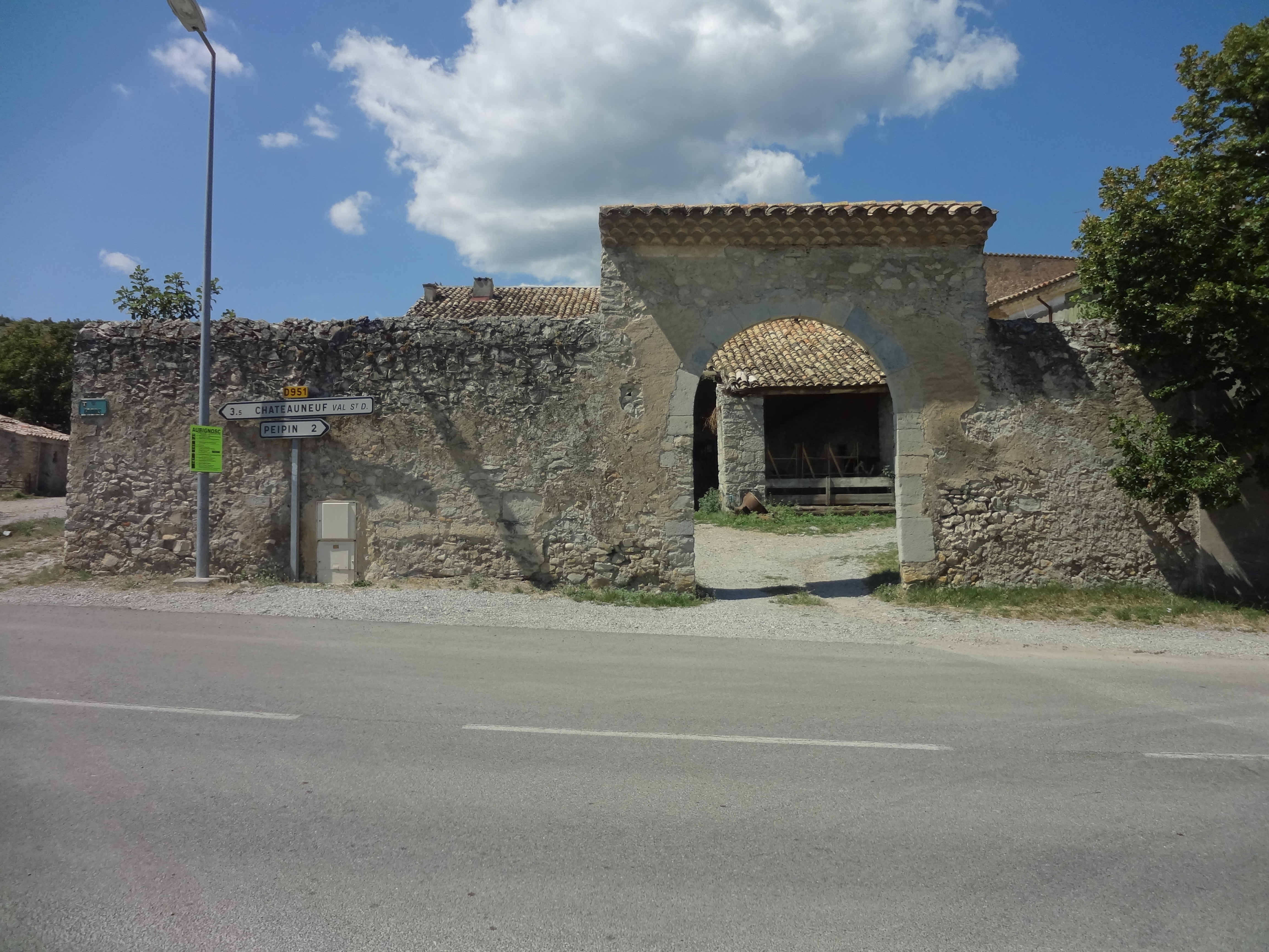 Date du XVIIe siècle, aussi appellée bastide.